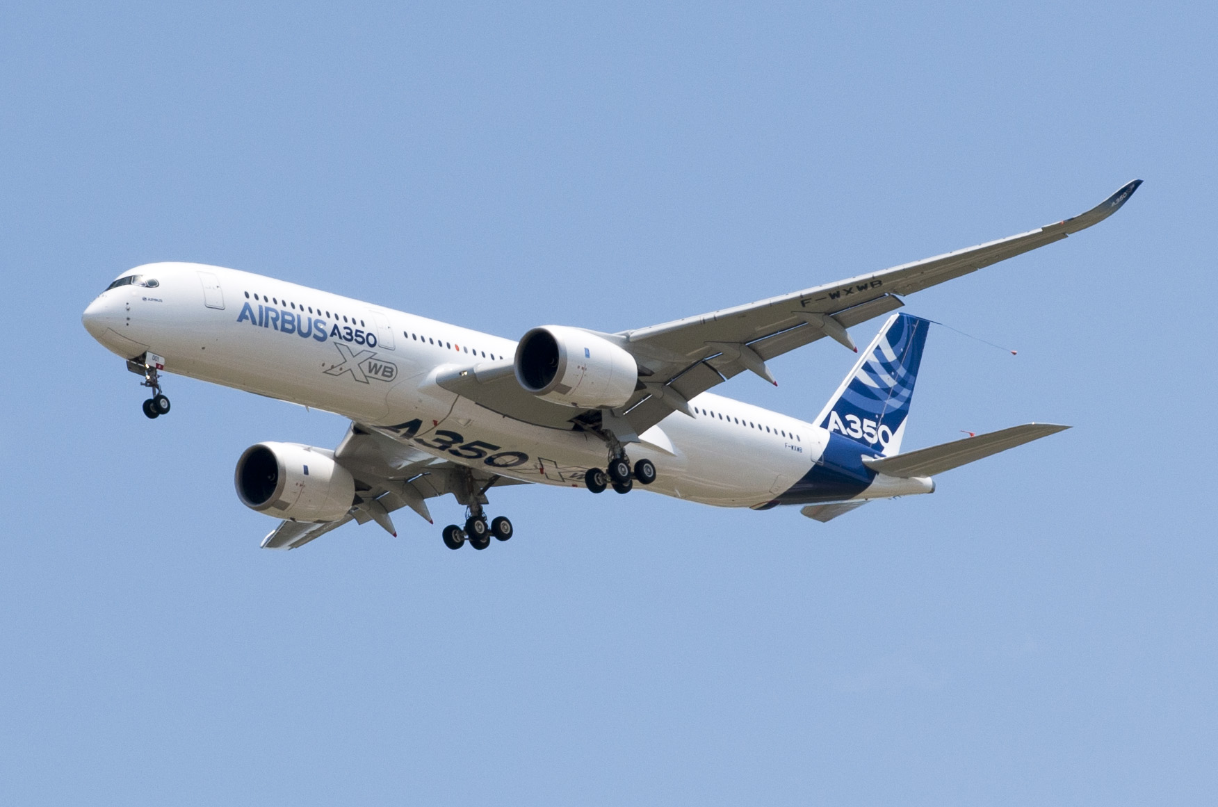 Passage basse altitude du premier exemplaire de l'A350, sur le site Airbus de Toulouse